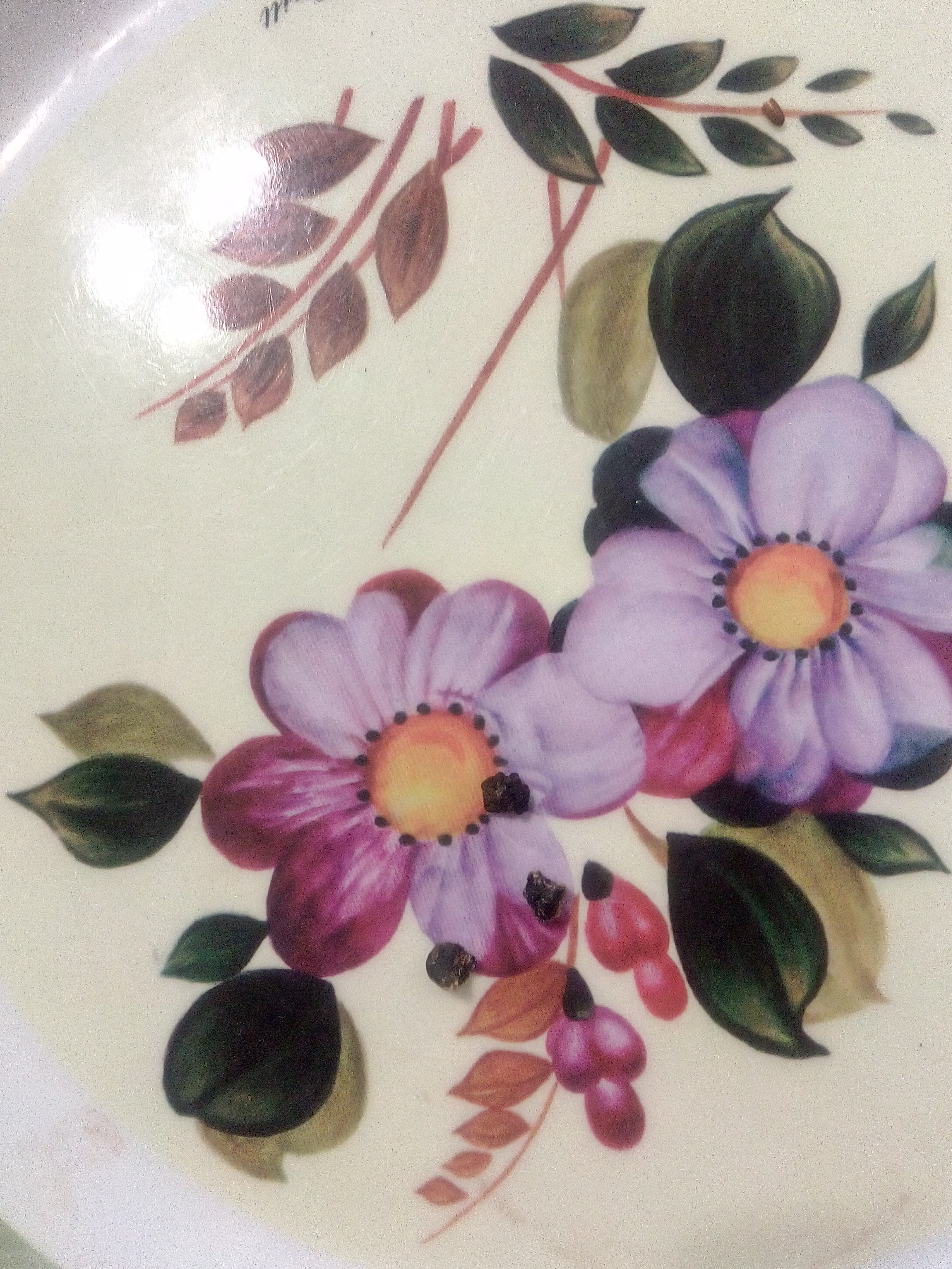 三顆葡萄乾大，如石頭般堅硬的耳屎